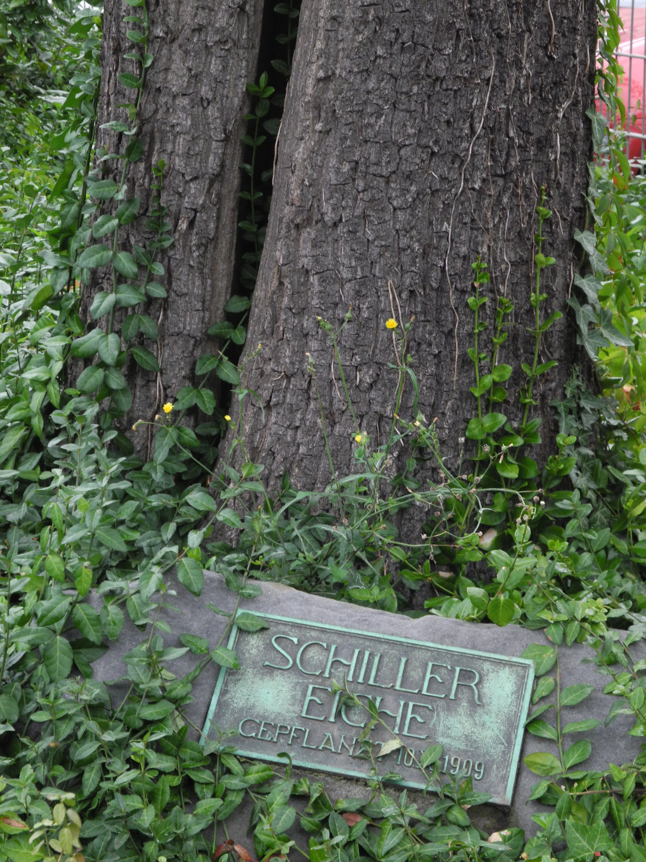 Naturdenkmal in Kassel 611.100. "1 Stieleiche" (Quercus robur) - Brüder-Grimm-Platz, Grünfläche an der Wilhelmshöher Allee. Mit namensgebenden Gedenkstein SCHILLER EICHE.